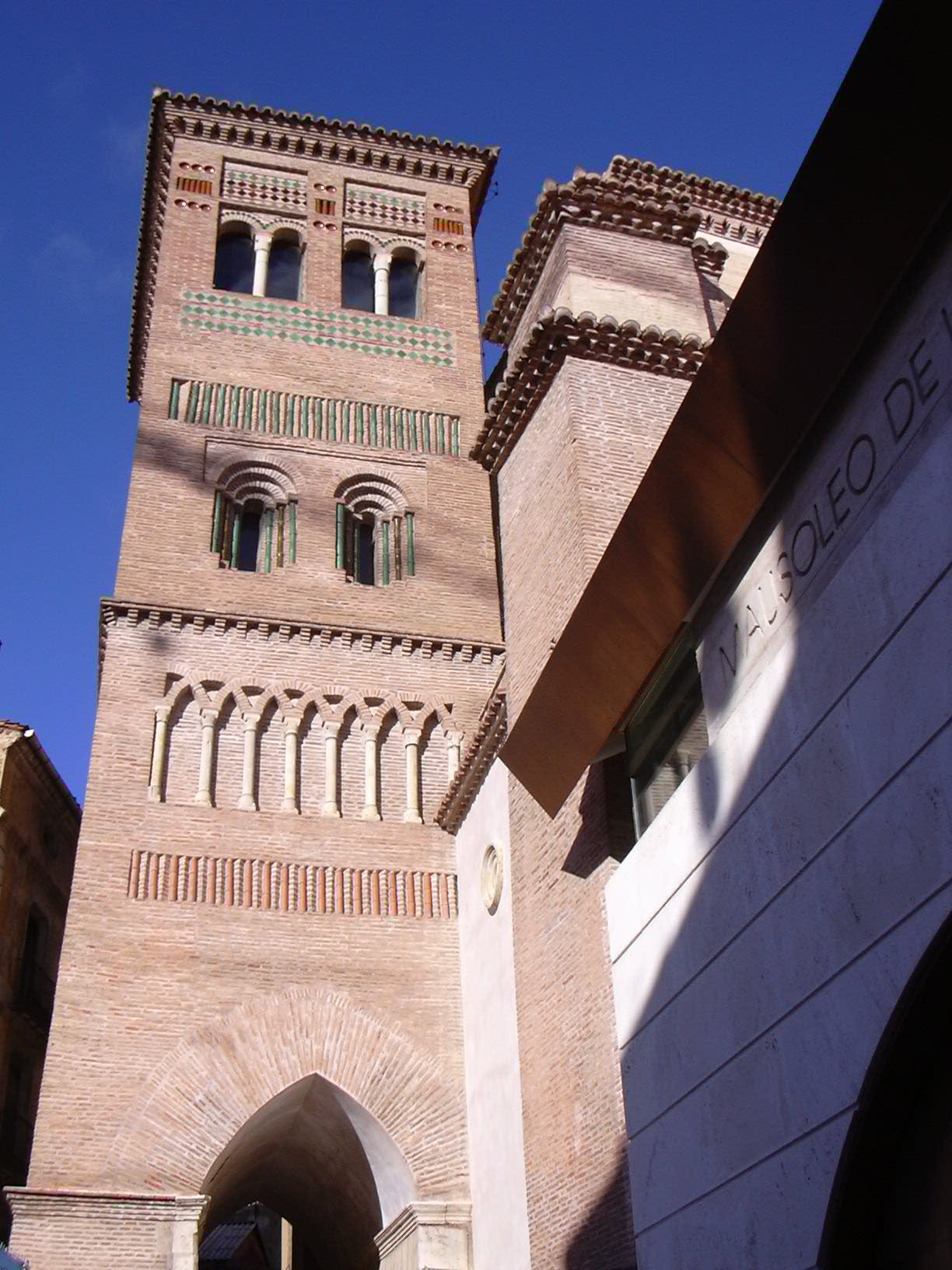 Teruel - Torre de San Pedro